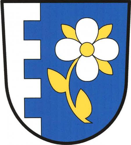 znak,Mnichovice , okres Benešov